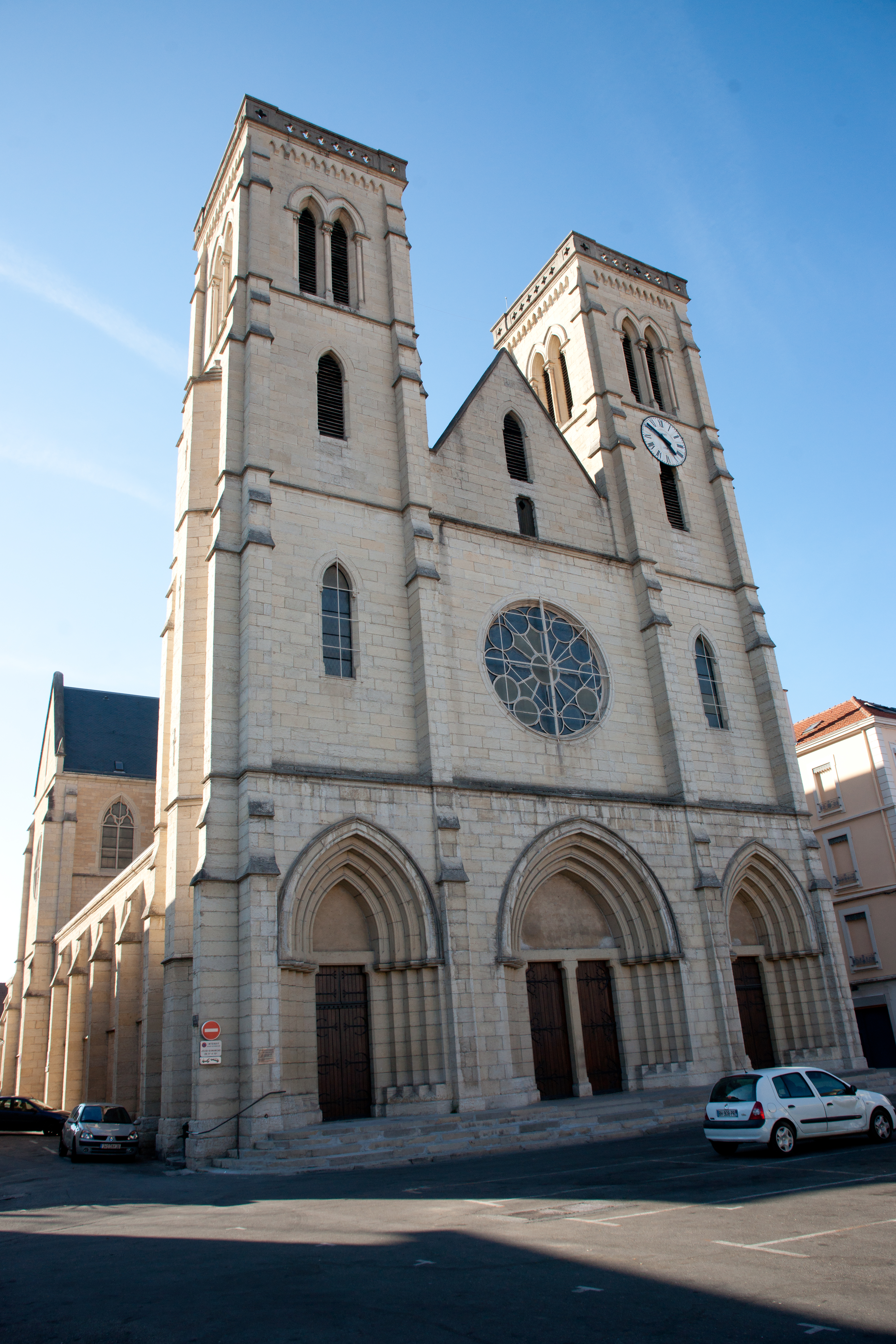 Bourgoin-Jallieu - église - façade